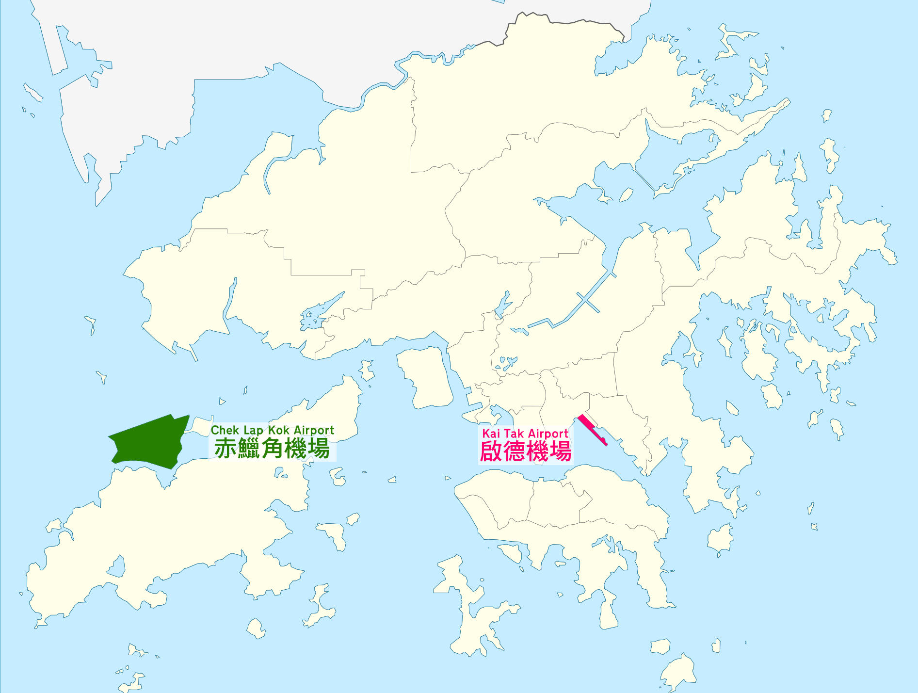 香港赤鱲角機場和啟德機場位置圖。上載者原創。